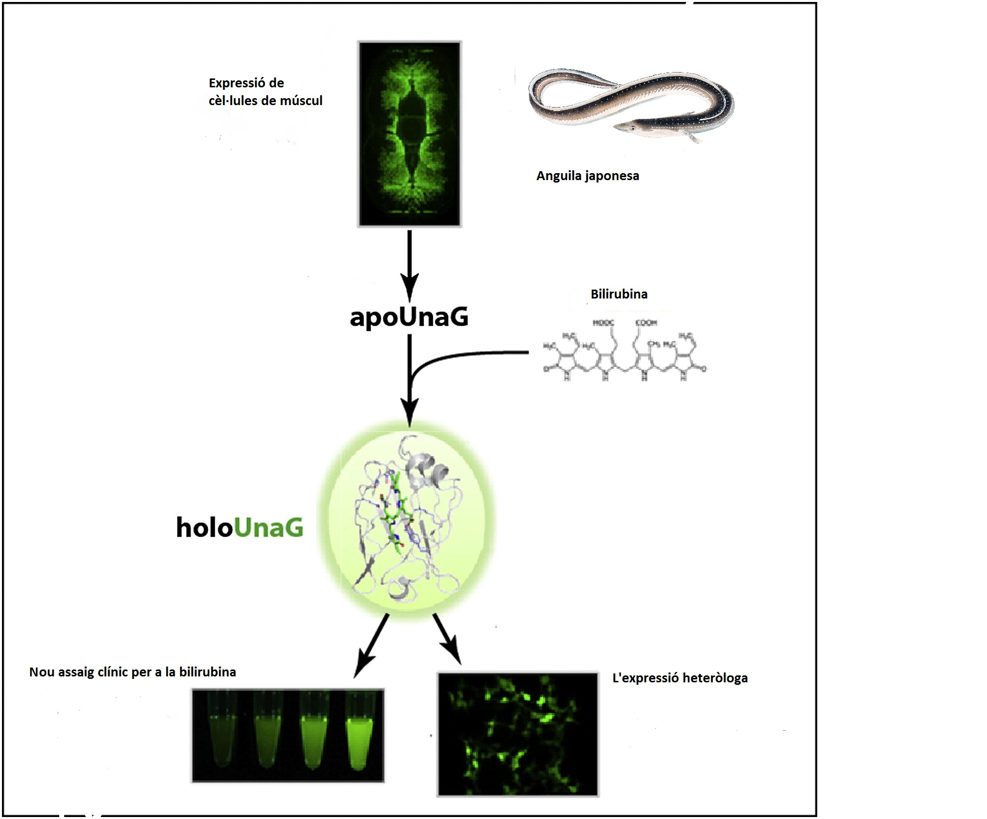 Bilirubina amb la UnaG